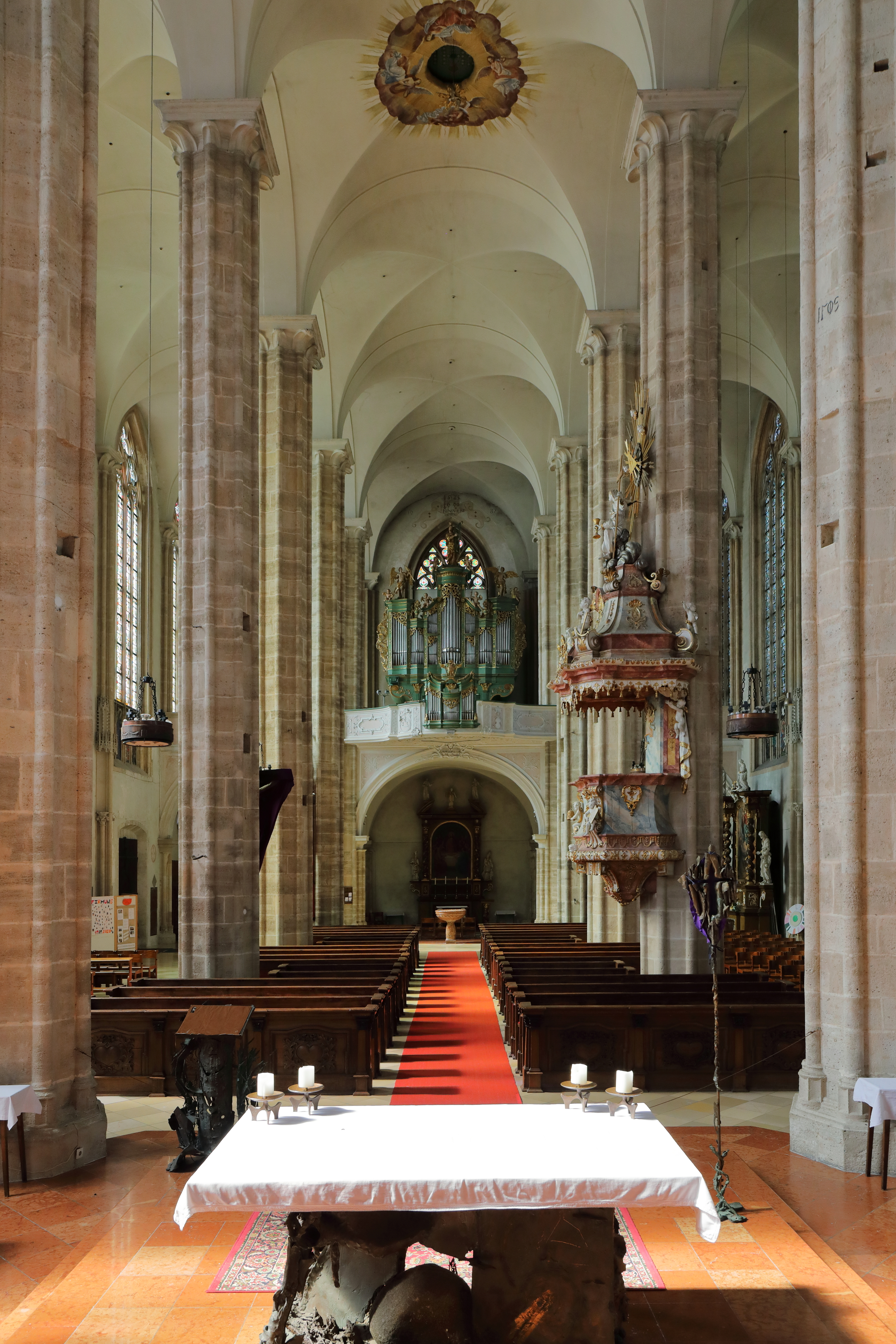 Blick vom Altarraum in Richtung Orgelempore in der röm.-kath. Pfarrkirche St. Othmar in der niederösterreichischen Stadt Mödling.Die dreischiffige, gotische Hallenkirche wurde von 1454 bis 1523 errichtet. Die spätbarocke Orgel stammt aus dem Jahr 1727 und wurde später mehrmals verändert bzw. erweitert.